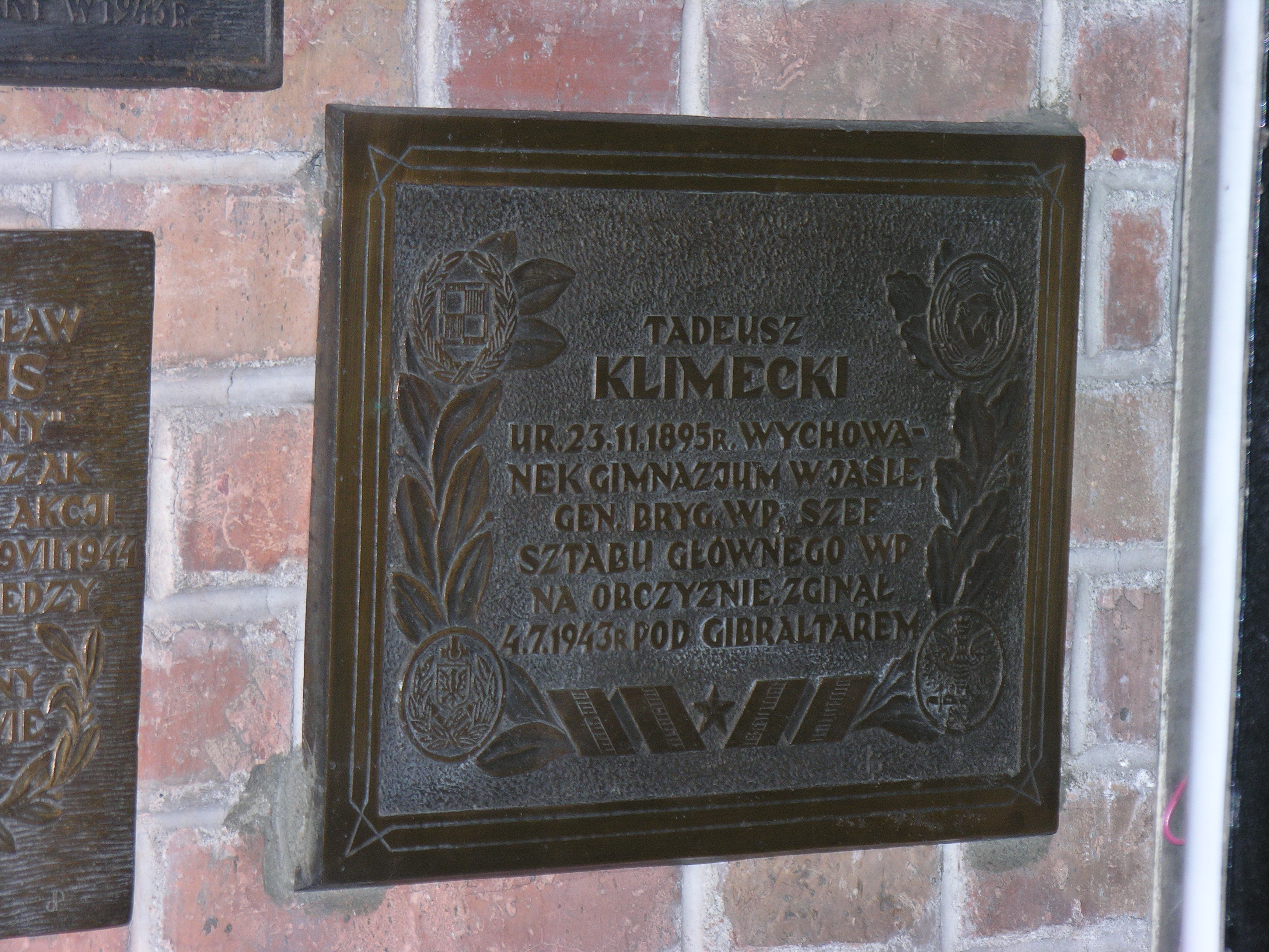 Tablica ku czci generała Tadeusza Klimeckiego w kościele św. Antoniego (franciszkanów) w Jaśle